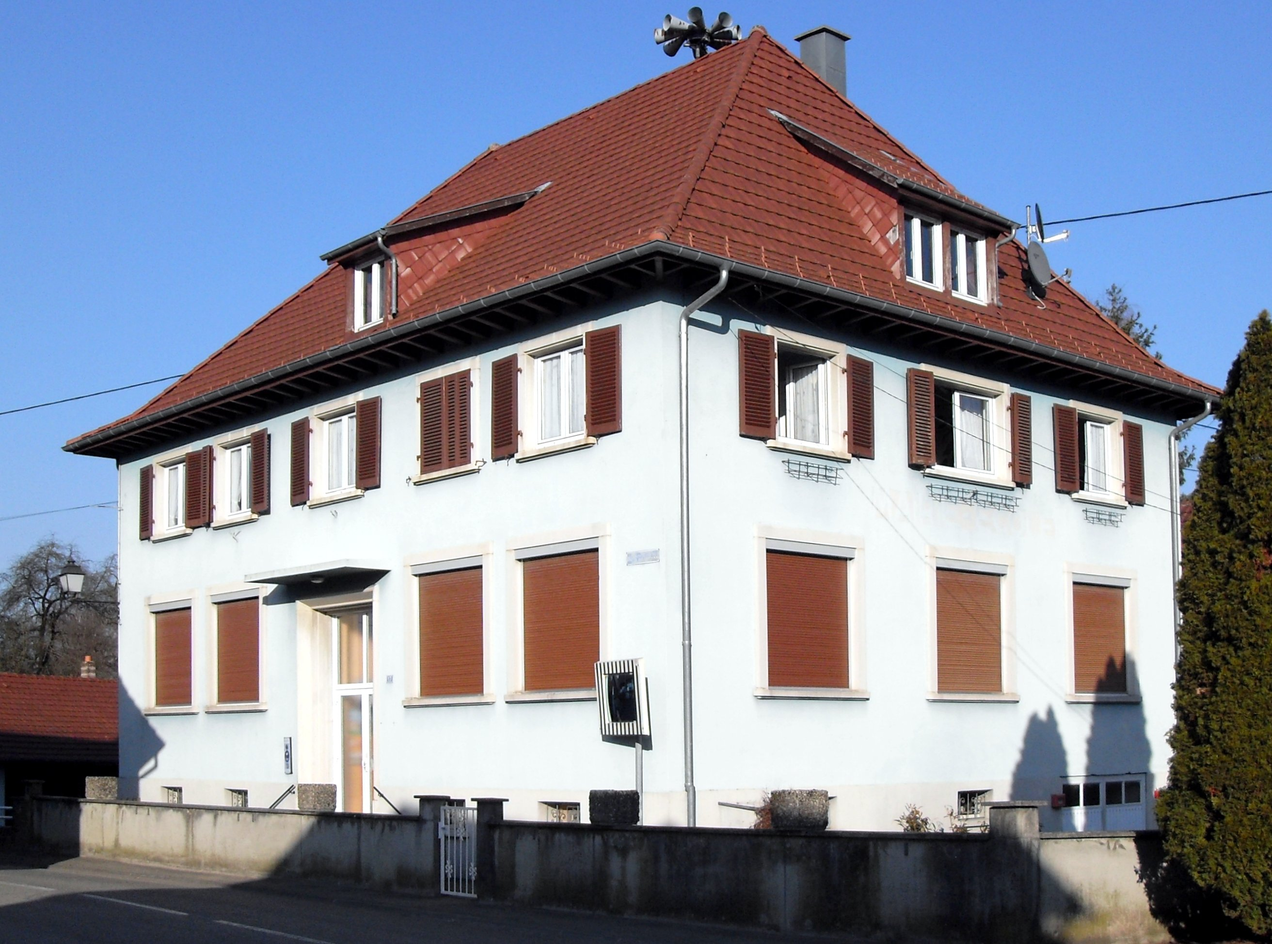 La mairie de Ruederbach